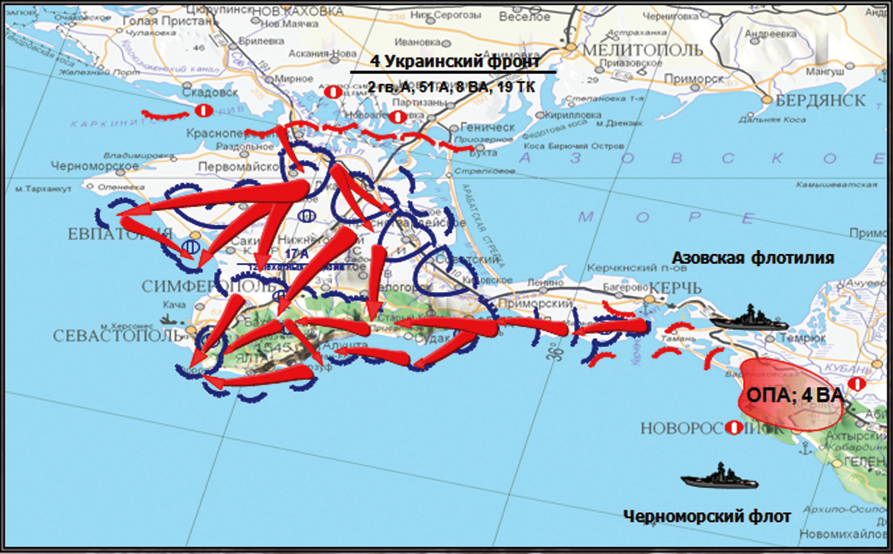 Крымская стратегическая наступательная операция 8 апреля – 12 мая 1944 г.